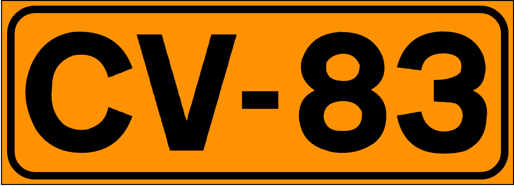 Inidcador de la Carretera de la Comunidad Valenciana CV-83